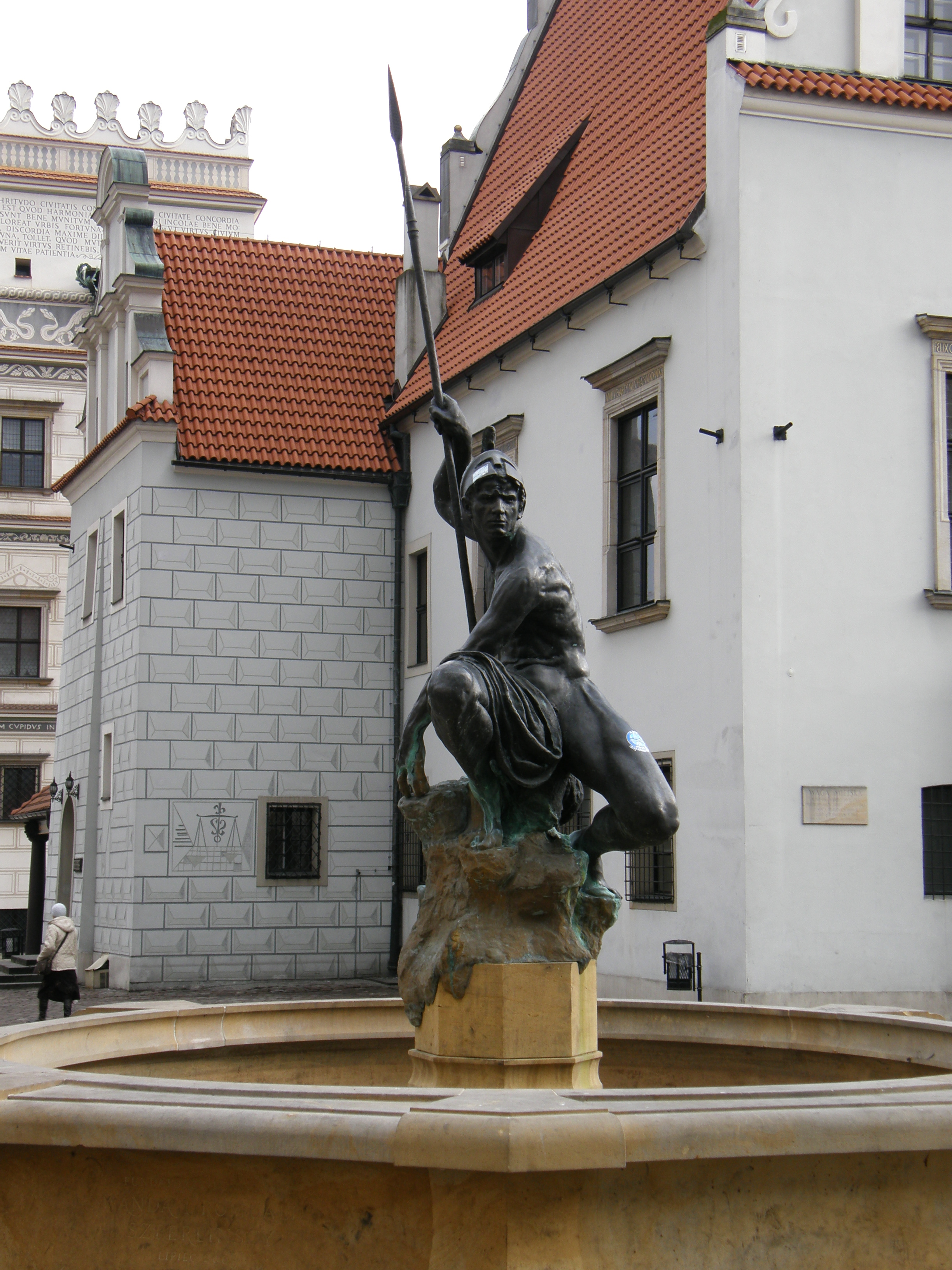 Poznań, Stary Rynek - Fontanna Marsa